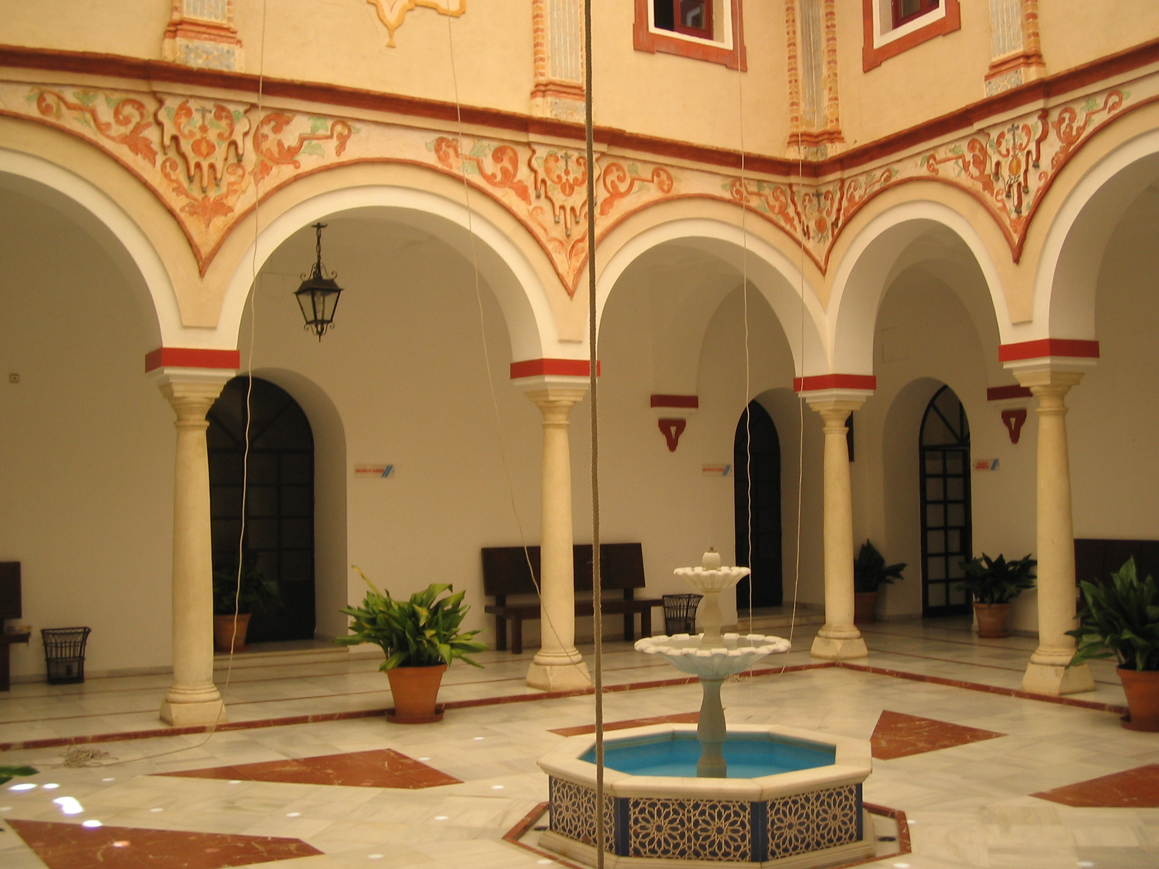 Sevillian style patio.